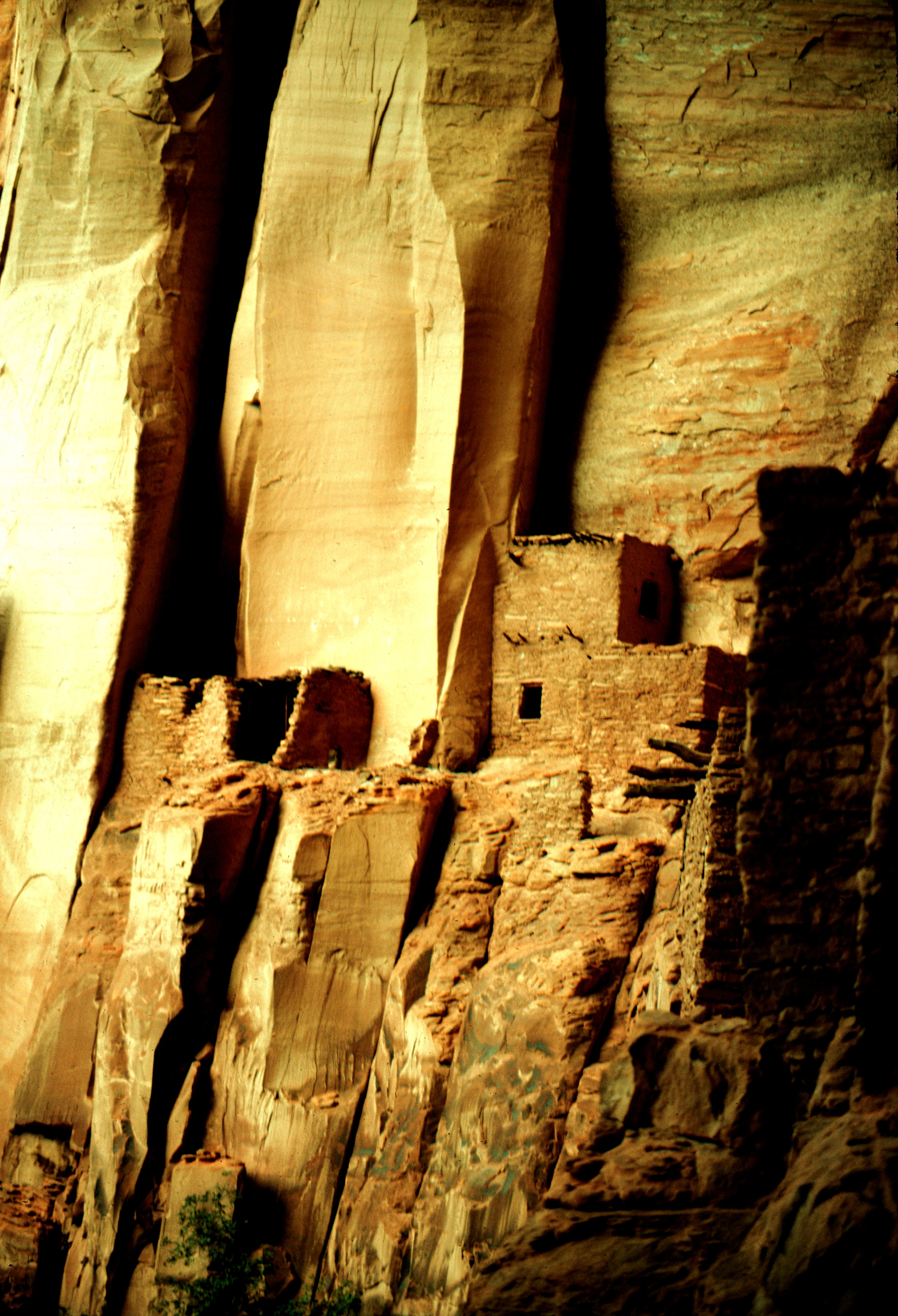 Ruinas anasazi, Cañón de Chelly - Arizona Description: Ruins of adobe pueblos of the Anasazi people in arizona Source: Ulrich Egert